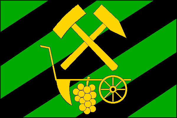 Vlajka města Zbýšov v okrese Brno-venkov